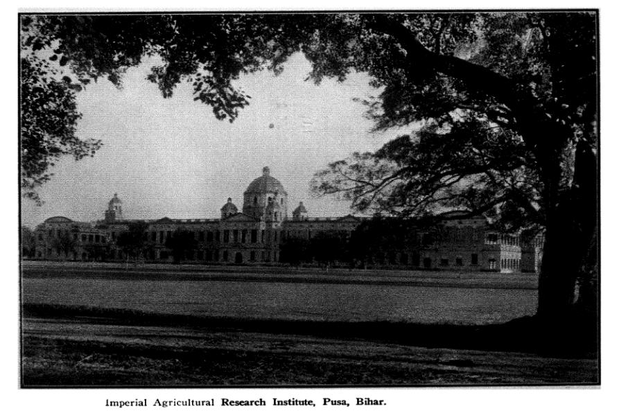 Imperial Agricultural Research Institute, Pusa, Bihar, India